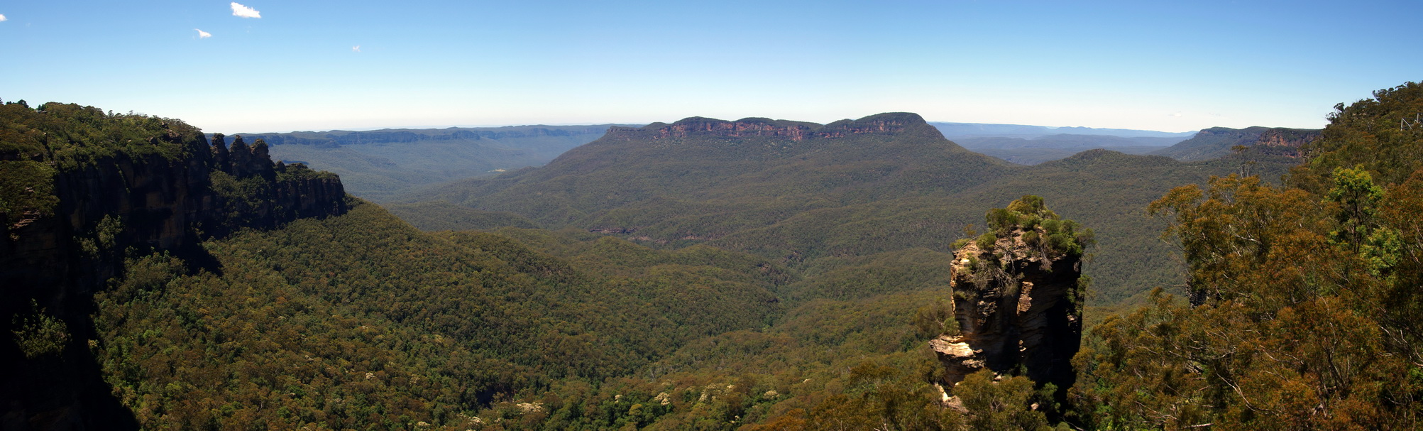 Panorama der Blue Mountains